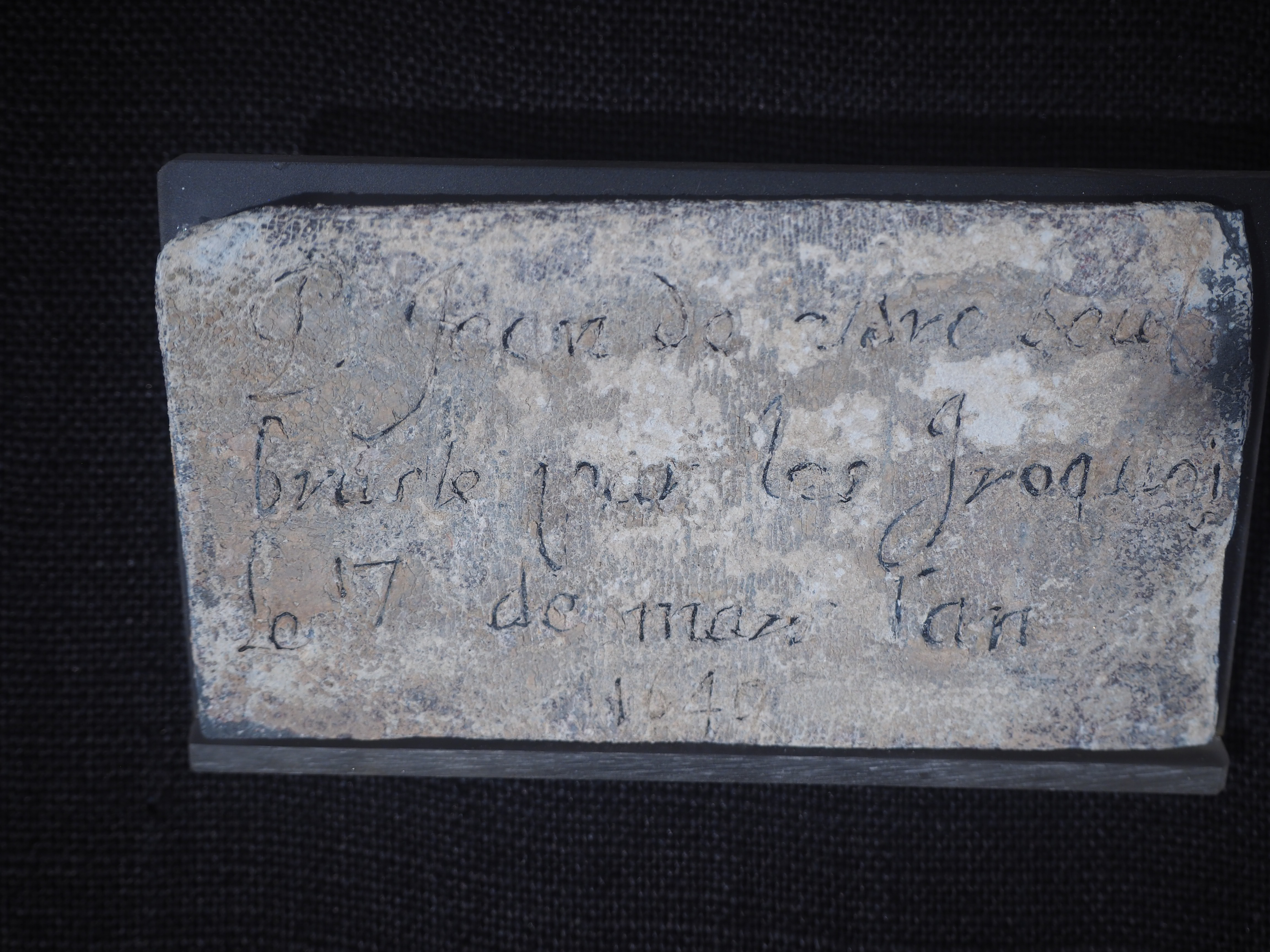 Plaque de plomb originelle. L'inscription se lit : P. Jean de Brebeuf bruslé par les Iroquois le 17 de mars l'an 1649. En 1954, au cours d'excavations au site de Sainte-Marie-au-pays-des-Hurons, le Père Denis Hegarty SJ, l’un des pères au service du sanctuaire, découvrit la plaque dans la chapelle des indiens.